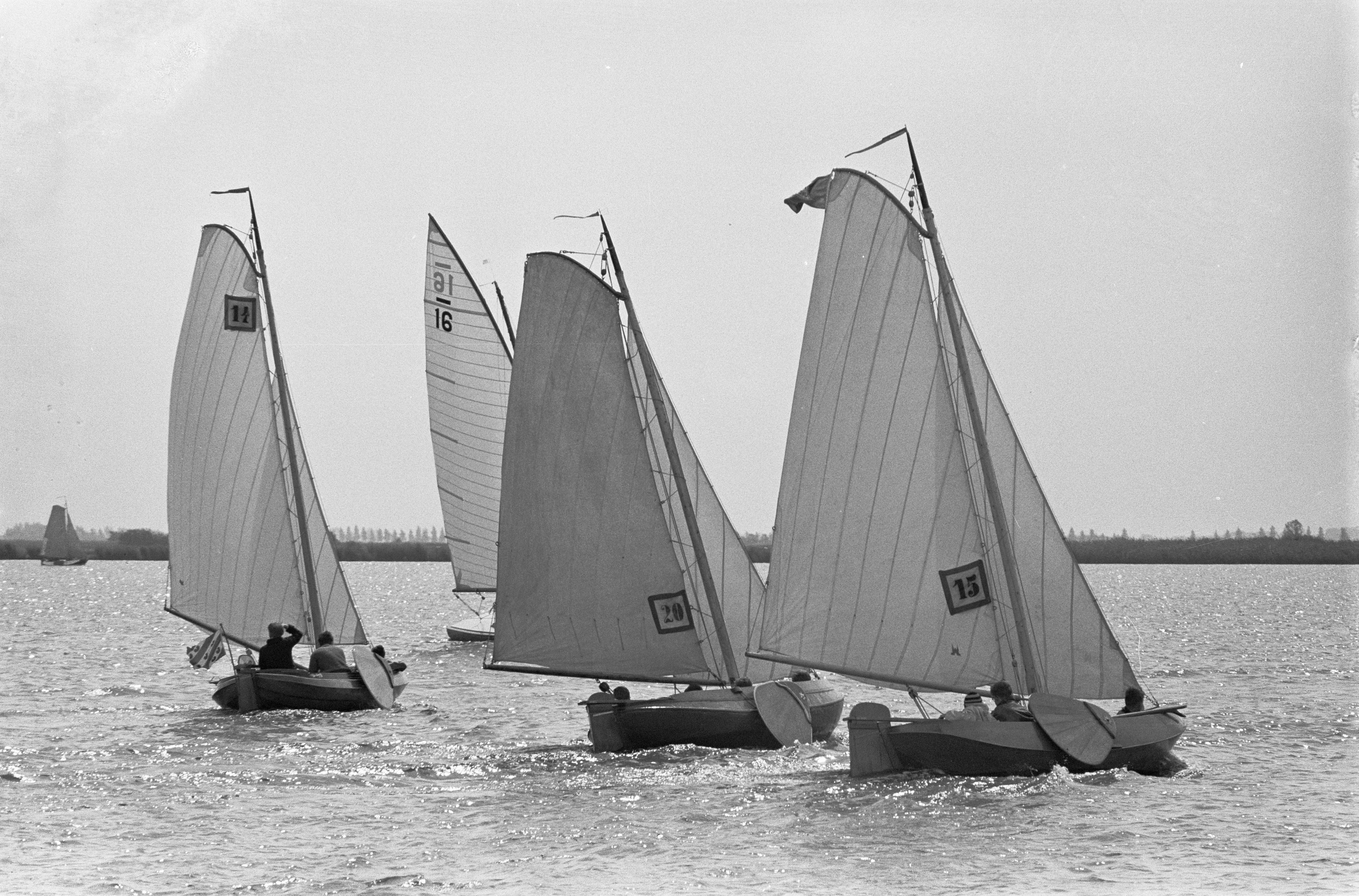 Collectie / Archief : Fotocollectie Anefo Reportage / Serie : De jubileum Sneekweek Beschrijving : De "Tjotters" tijdens de wedstrijd Datum : 17 augustus 1960 Locatie : Friesland, Sneek Trefwoorden : watersporten, zeilen, zeilschepen Fotograaf : Fotograaf Onbekend / Anefo, [onbekend] Auteursrechthebbende : Nationaal Archief Materiaalsoort : Negatief (zwart/wit) Nummer archiefinventaris : bekijk toegang 2.24.01.05 Bestanddeelnummer : 911-5057